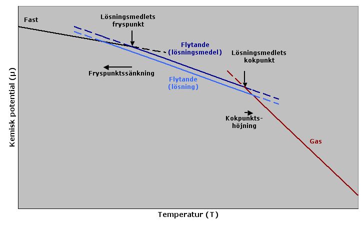 Principbild av den kemiska potentialen mot temperaturen, som en förklaring av fryspunktssänkning och kokpunktshöjning. Principle graph of chemical potential against temperature explaining freezing point depression and boiling point elevation, but in Swedish.